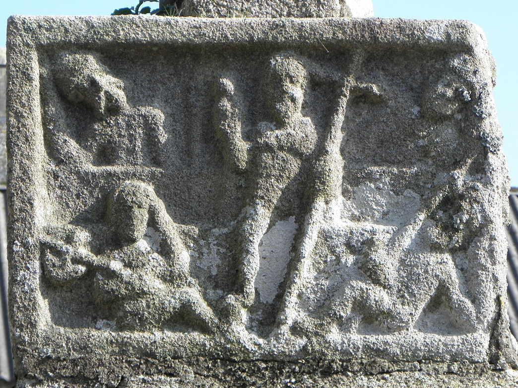 Résurrection. Détail du soubassement du calvaire de Saint-Servais (29).